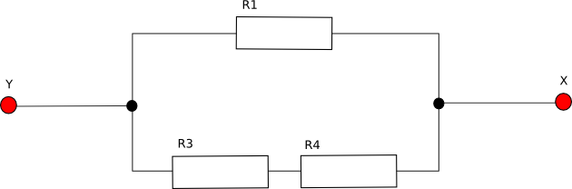 Zjednodušený obvod tvoří vnitřní odpor zdroje.